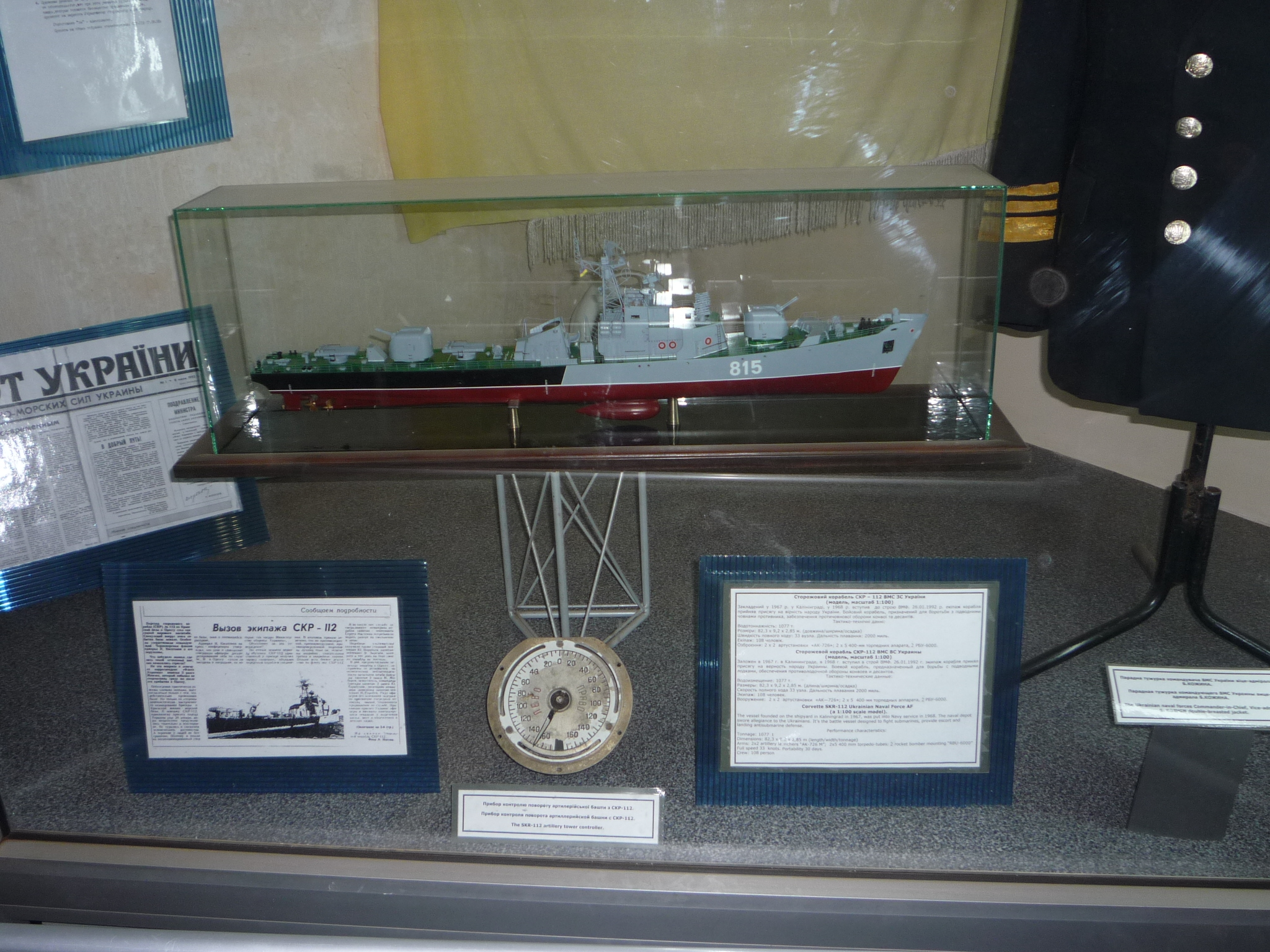 Модель СКР-112, первого корабля ВМС Украины, музей флота в Балаклаве.